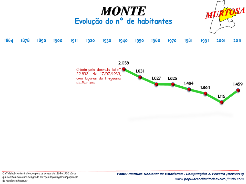 Evolução da População 1864 / 2011